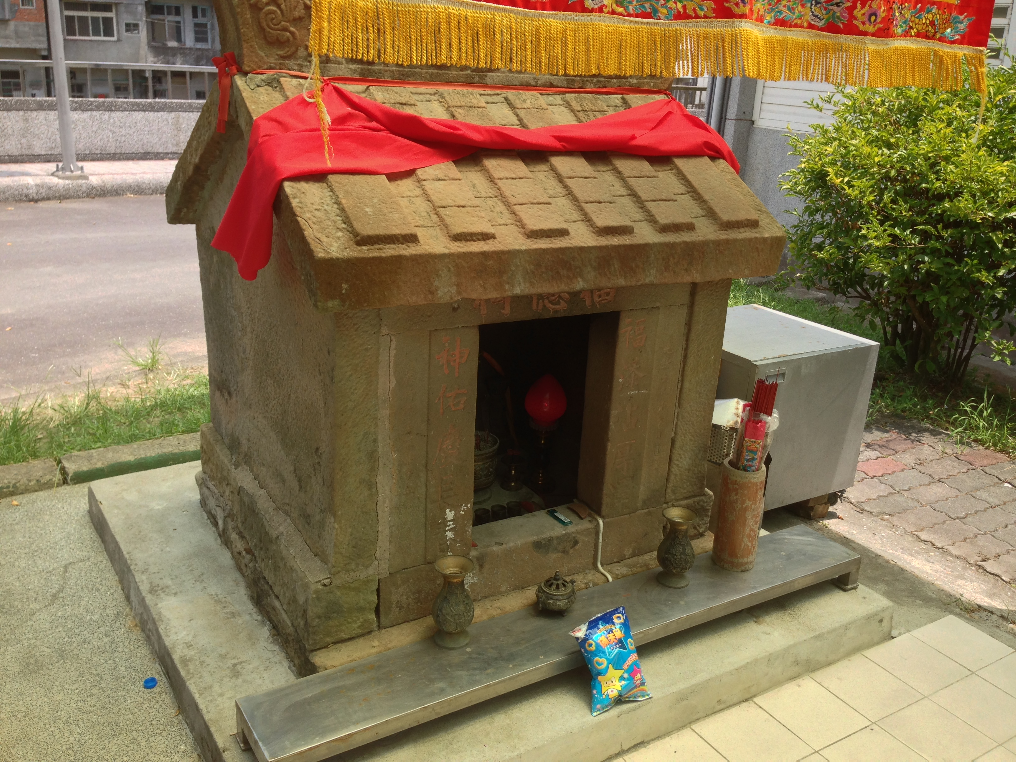 麻竹坑福德祠近照